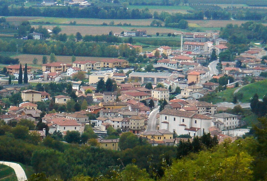 Rugolo (Treviso): veduta di Sarmede.